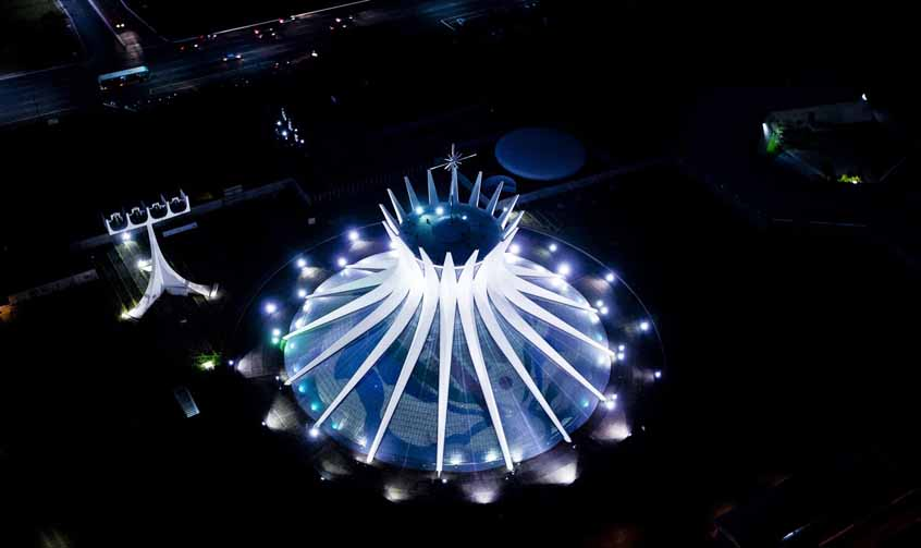 Há 25 anos atrás, Brasília foi declarada Patrimônio Cultural da Humanidade Foto: Bento Viana migre.me/cyZ4b